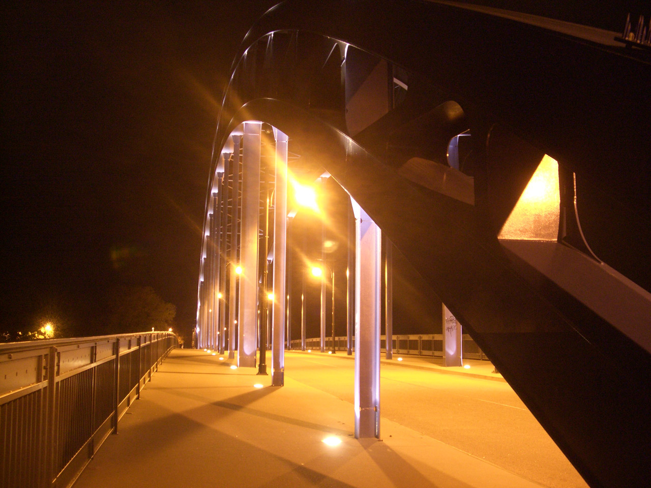 Nachtfoto der Sternbrücke in Magdeburg